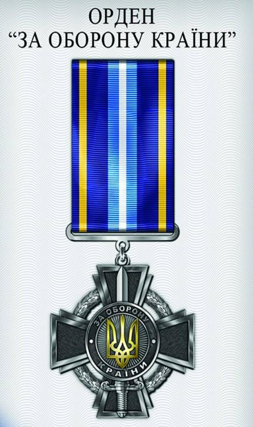 Нагрудний знак «За оборону країни»